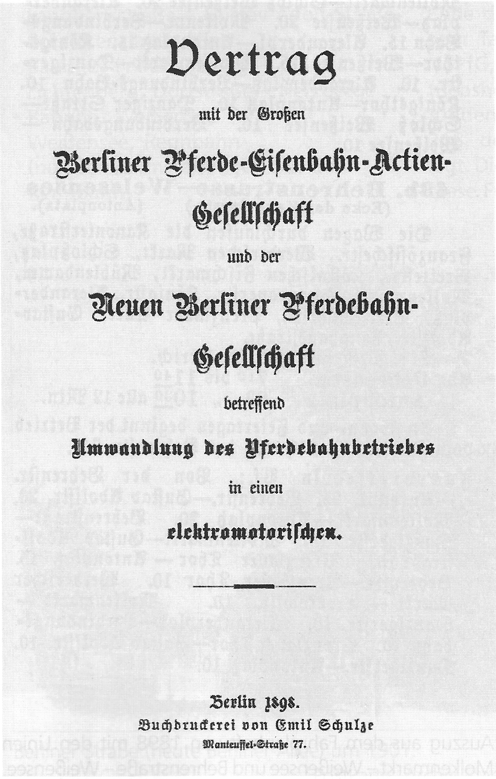 Deckblatt zum Elektrifizierungsvertrag der Großen Berliner Pferde-Eisenbahn-Actien-Gesellschaft und der Neuen Berliner Pferdebahn-Gesellschaft